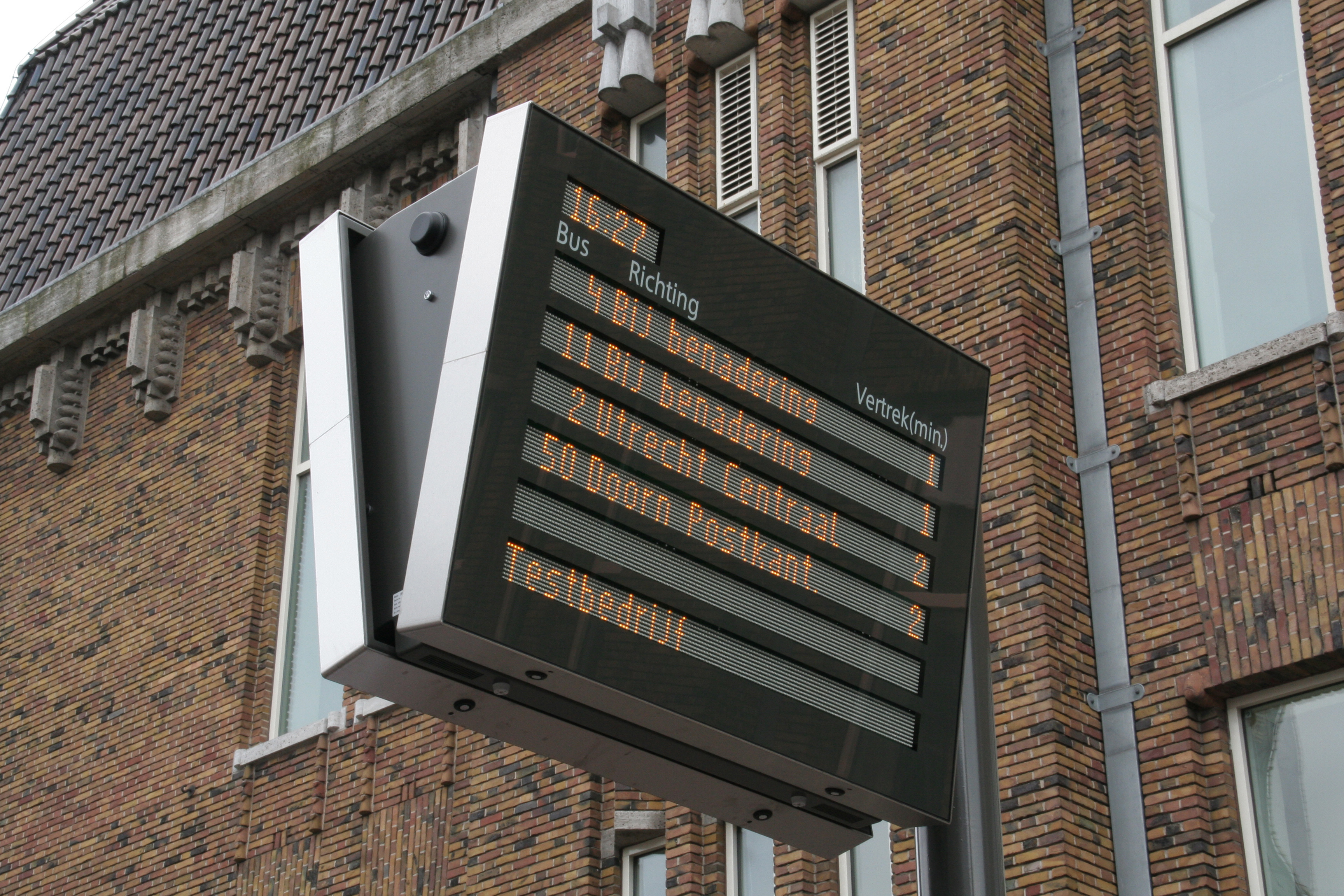 Een Dynamisch Reizigers Informatie Systeem in Utrecht